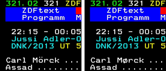 Vergleich einer Teletext-Seite, gerendert nach Level 1 und nach Level 1.5